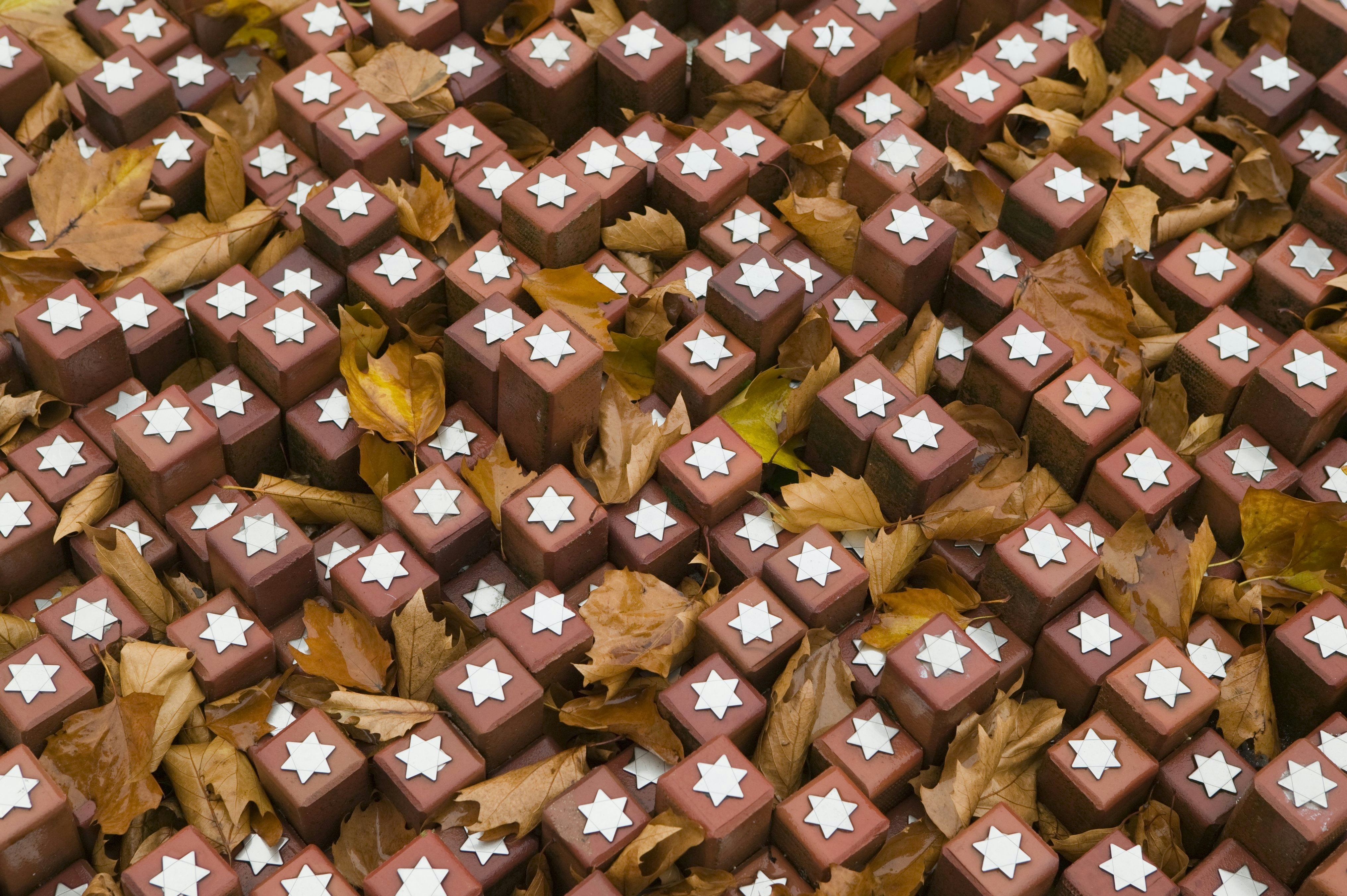 Kamp Westerbork: Het monument met de 102.000 stenen in het Herinneringscentrum Kamp Westerbork (opmerking: Gefotografeerd voor fotofolie nieuwbouw)